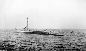 HMSM THAMES underway